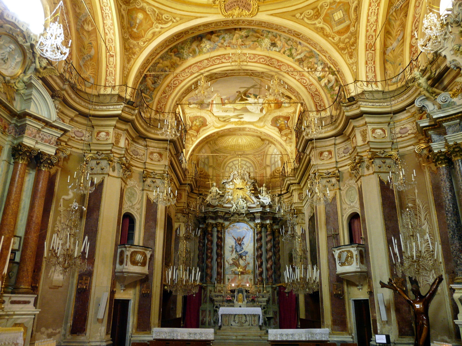 Navata centrale, oratorio di Nostra Signora Assunta, Campo Ligure, Liguria, Italia